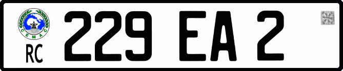 Схематичне зображення номерного знаку